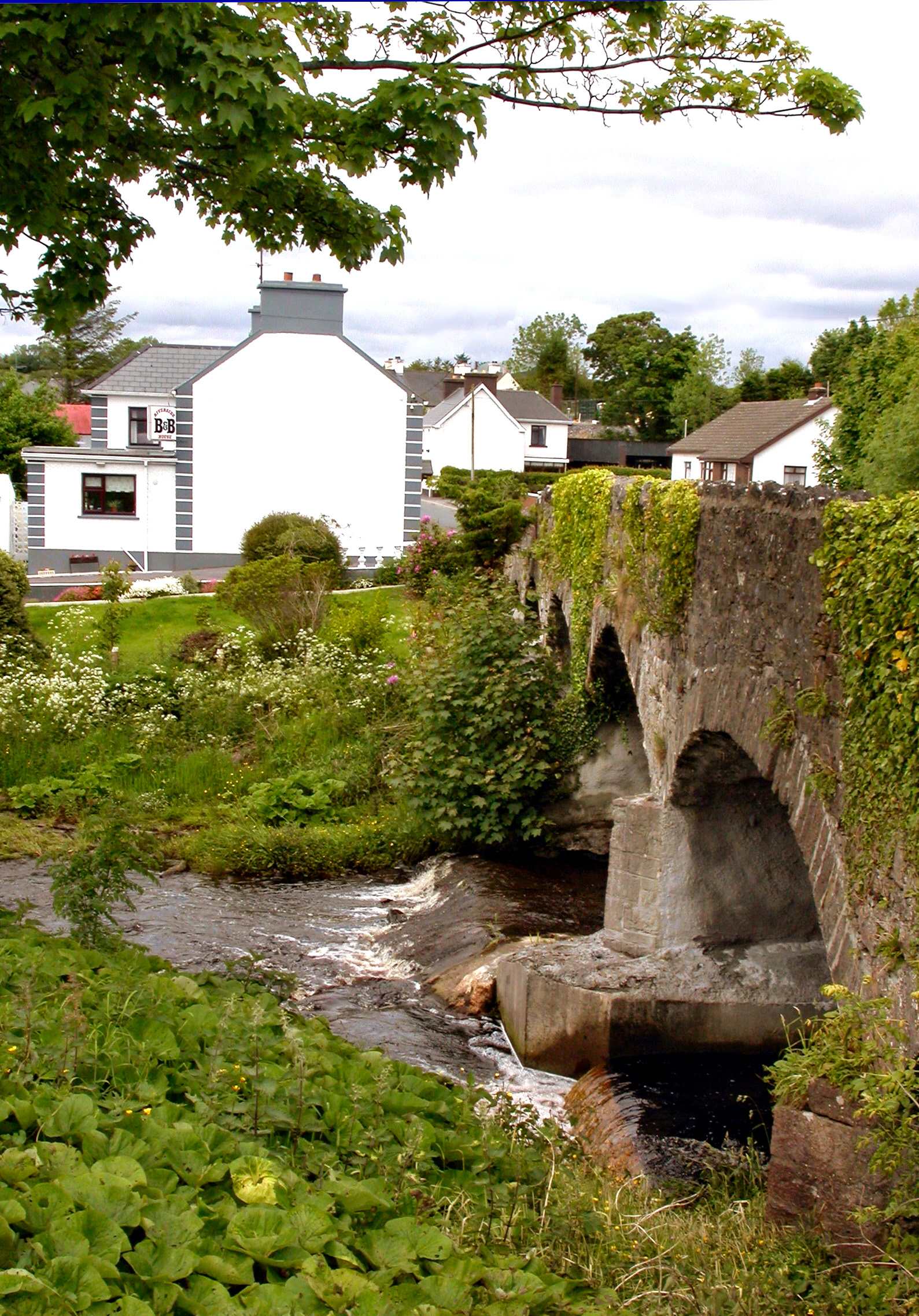 An Lathaigh, Co. Dun na nGall